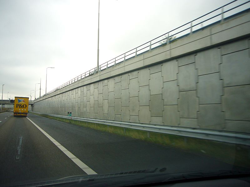 Terre armee keerwand langs de A15 bij Rozenburg. Eigen foto Caseman okt 2006.